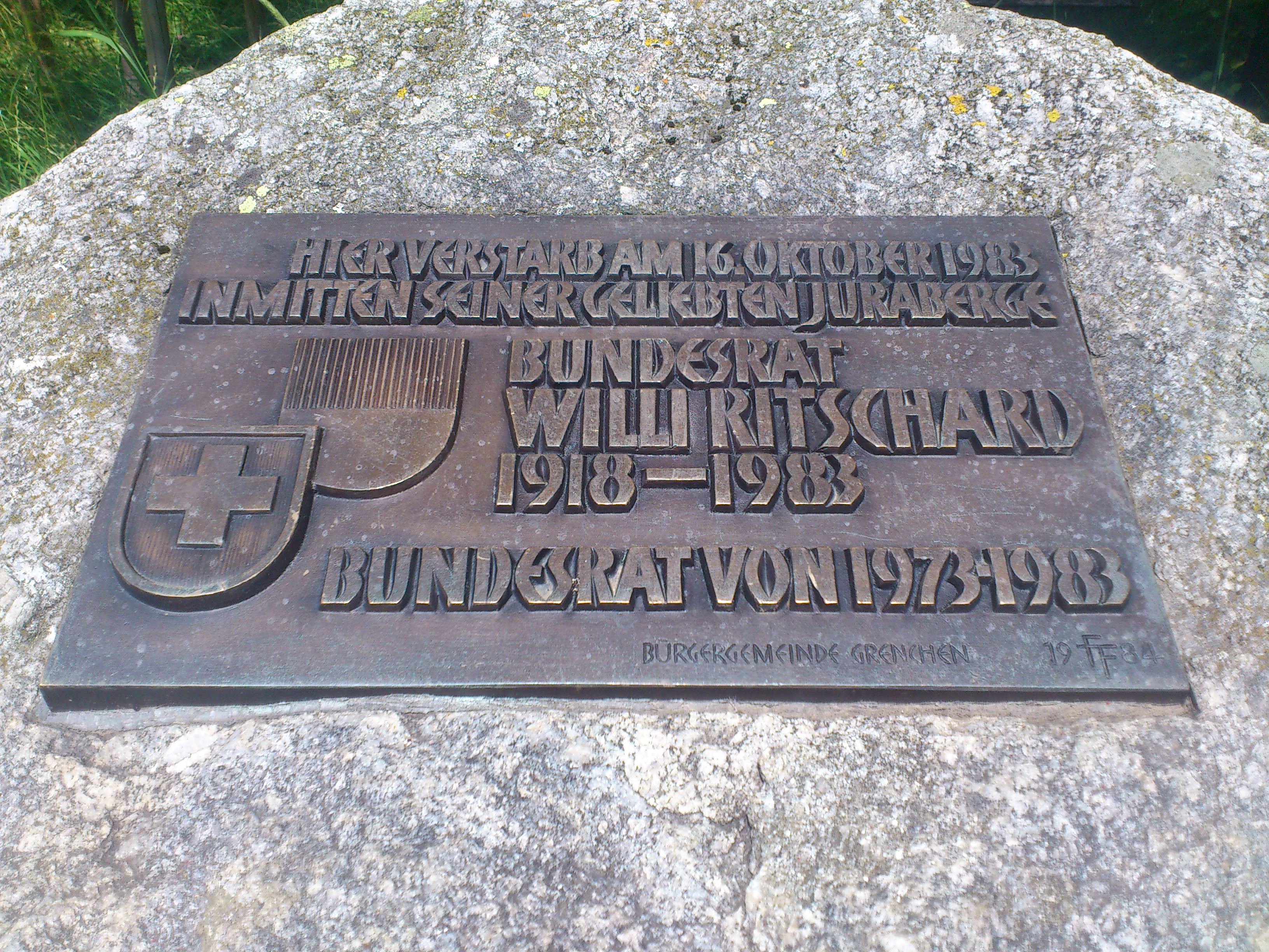 Willi Ritschard, Gedenktafel nördlich des Untergrenchenbergs mit der Inschrift: Hier verstarb am 16. Oktober 1983 inmitten seiner geliebten Juraberge Bundesrat Willi Ritschard 1918-1983, Bundesrat von 1973-1983, Bürgergemeinde Grenchen Object location47° 13′ 33.6″ N, 7° 22′ 37.2″ E